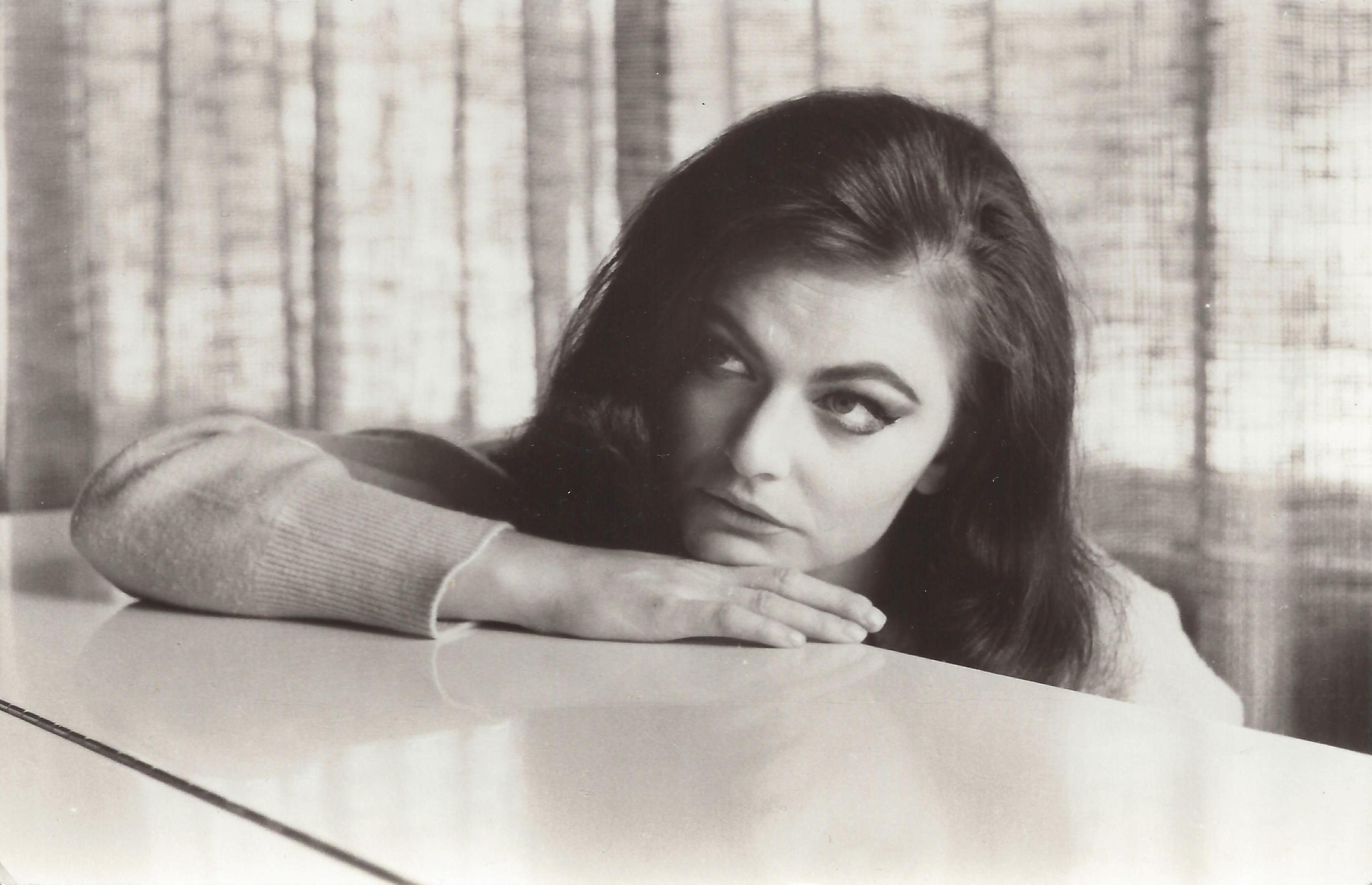 Inga-Lill Nilsson, 1965, vid en paus i repetitionen.